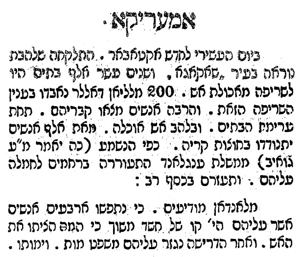 תיאור השריפה הגדולה של שיקגו